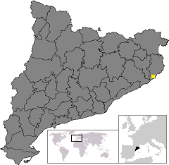 Localització de Sant Feliu de Guíxols. Location of Sant Feliu de Guíxols in Catalonia.